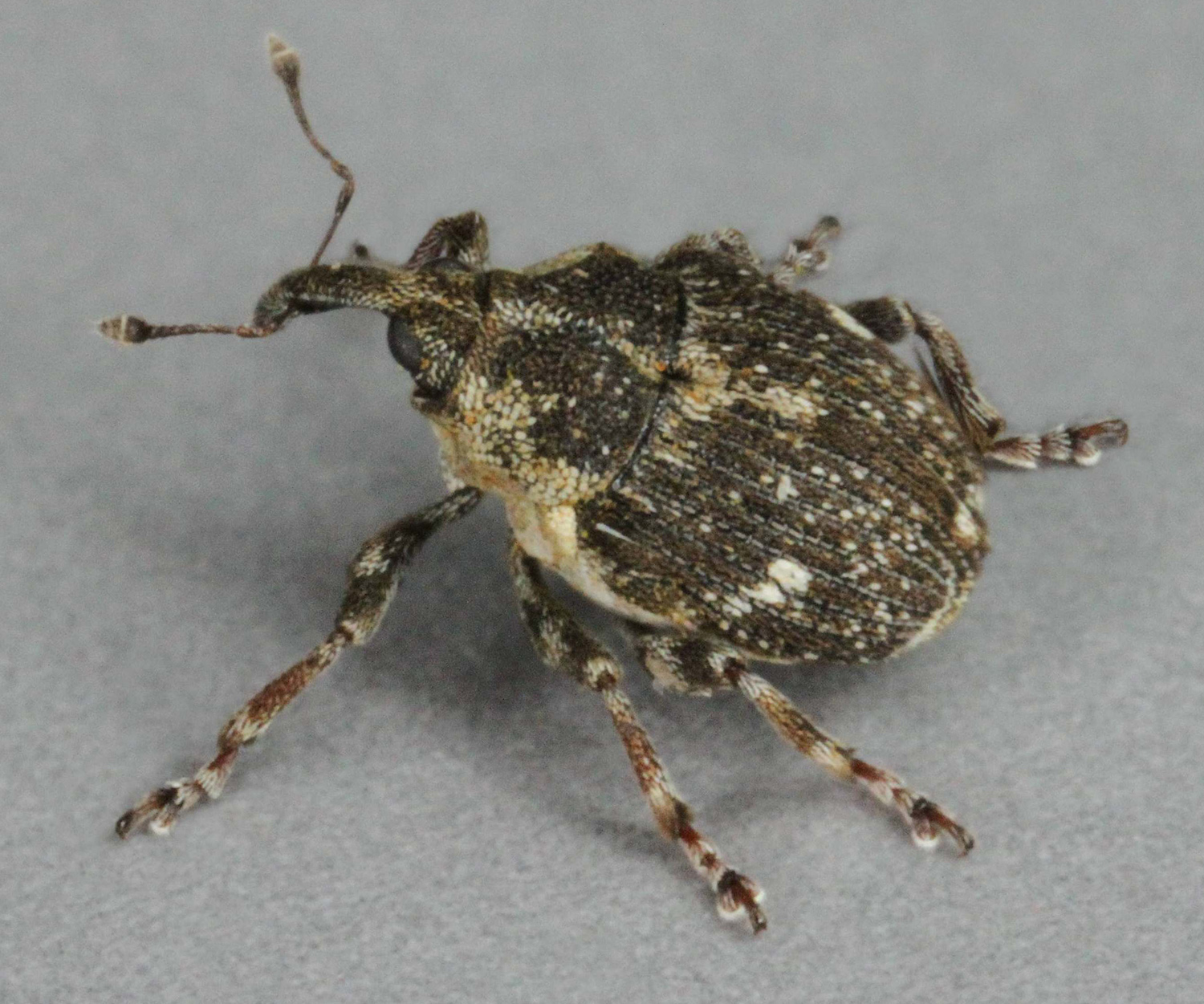 Nedyus quadrimaculata, Deeside Industrial Estate, North Wales, June 2011